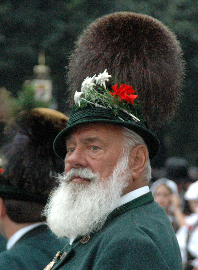 Vollbart mit Gamsbart beim Einzug der Wiesnwirte 2008